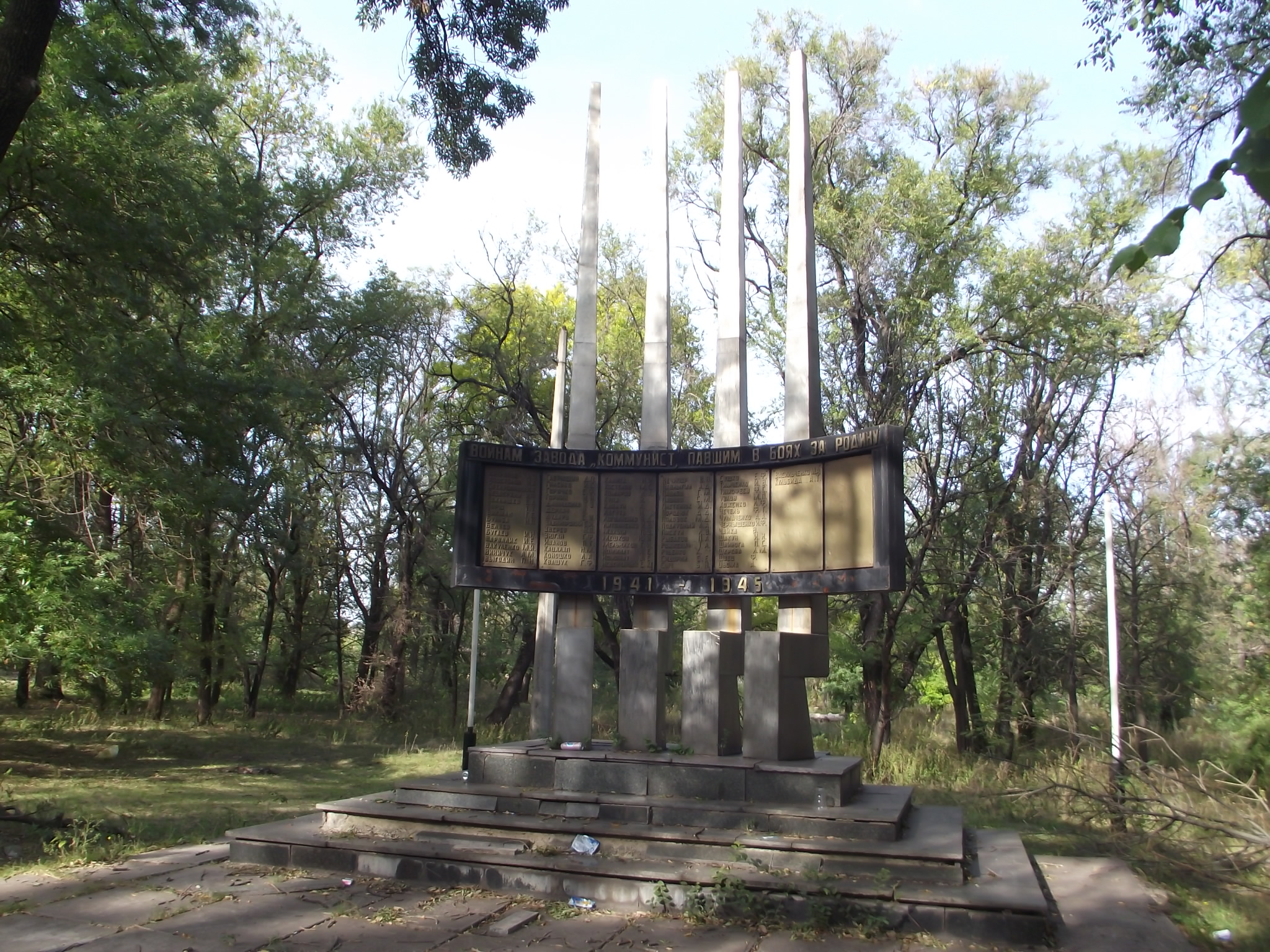 Пам’ятний знак робітникам і службовцям заводу гірничого машинобудування, які загинули у 1941-1945 рр., Кривий Ріг, вул. Комуністична,43, парк ВАТ «Криворіжгірмаш»